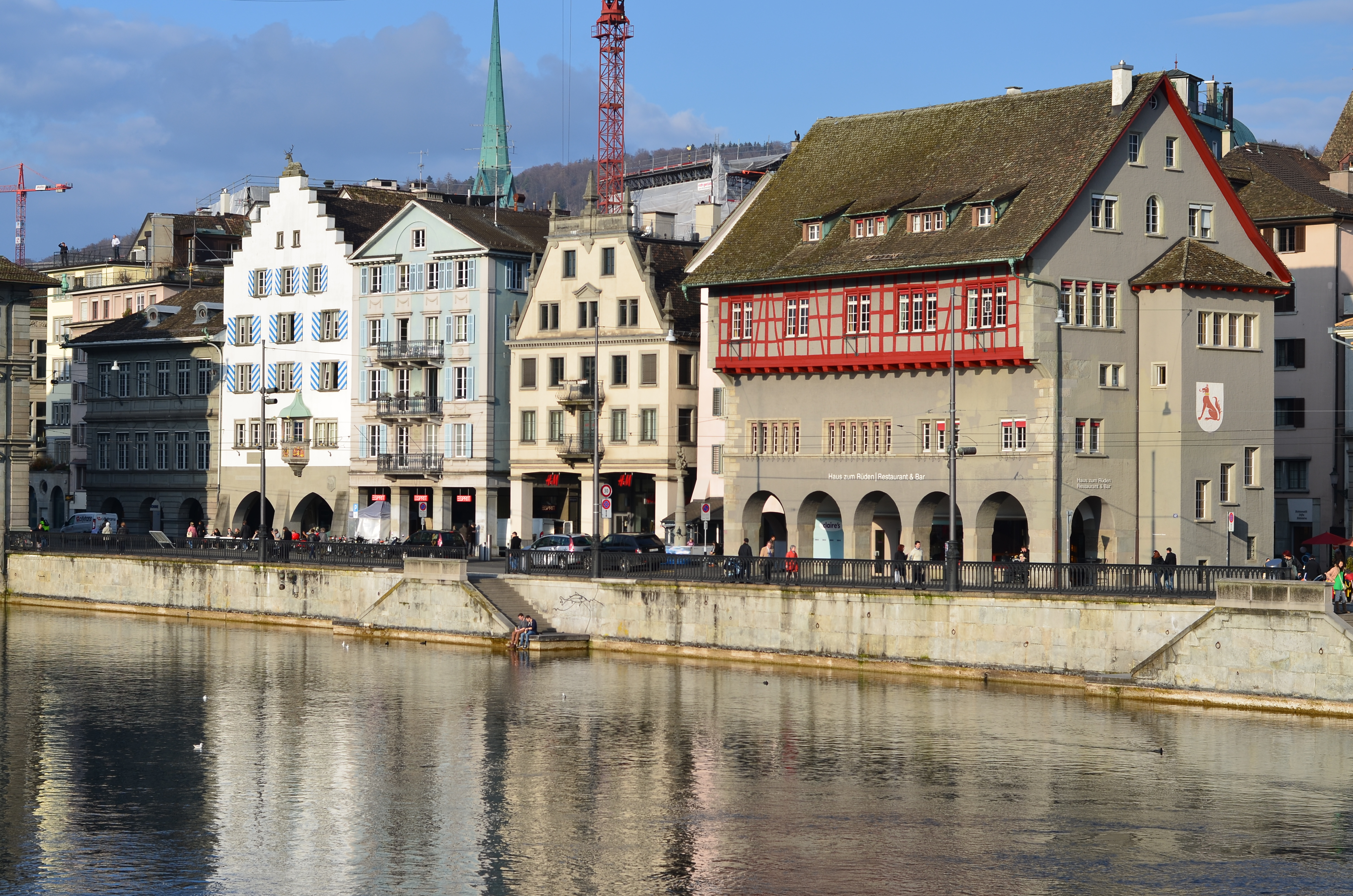 Zunfthaus zur Haue, Haus zum Rüden and Zunfthaus zur Zimmerleuten – rebuilt and newly inaugurated in October 2010 – at Limmatquai in Zürich (Switzerland), as seen from Münsterbrücke towards Münsterhof.